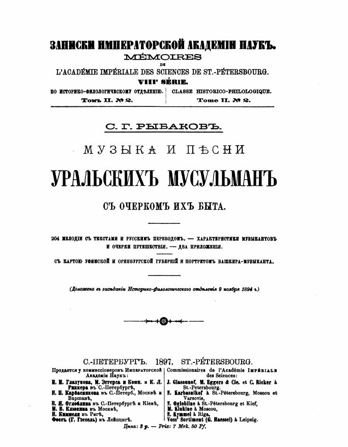 Книга С.Г. Рыбакова. Титульный лист.